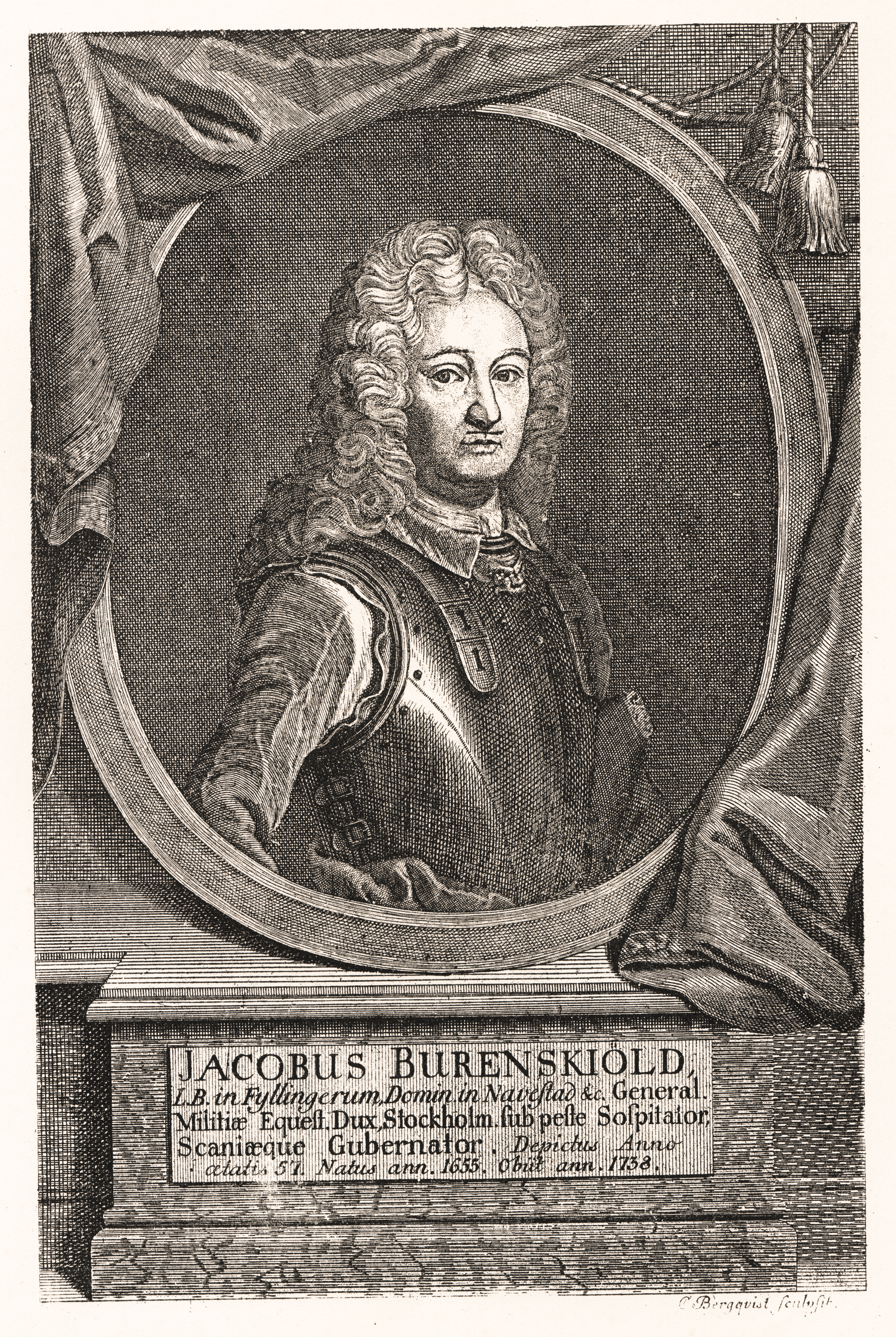 Jacob Burensköld (1655-1738). Porträtt graveradt af C. Bergqvist, möjligen efter förebild af David v. Krafft eller någon af hans efterföljare; i alla händelser må påpekas, att någon sådan af Krafft utförd bild ej finnes omnämnd i A. Hahrs förträffliga studie öfver Krafft (utg. 1900). Förebilden till Bergqvists stick är utförd 1712, då Burensköld öfvertog guvernörsämbetet i Skåne, hvilket ämbete han lämnade redan 1716 d. v. s. ett helt år innan Krafft i nämnda provins gjorde ett längre uppehåll för att “afkonterfeja“ Karl XII och hans generaler. Däremot kan man möjligen gissa på Johan Starbus, som begaf sig till Skåne 1712 eller 1713 för att i Kristianstad porträttera Stanislaus Leszczynskis gemål och döttrar.